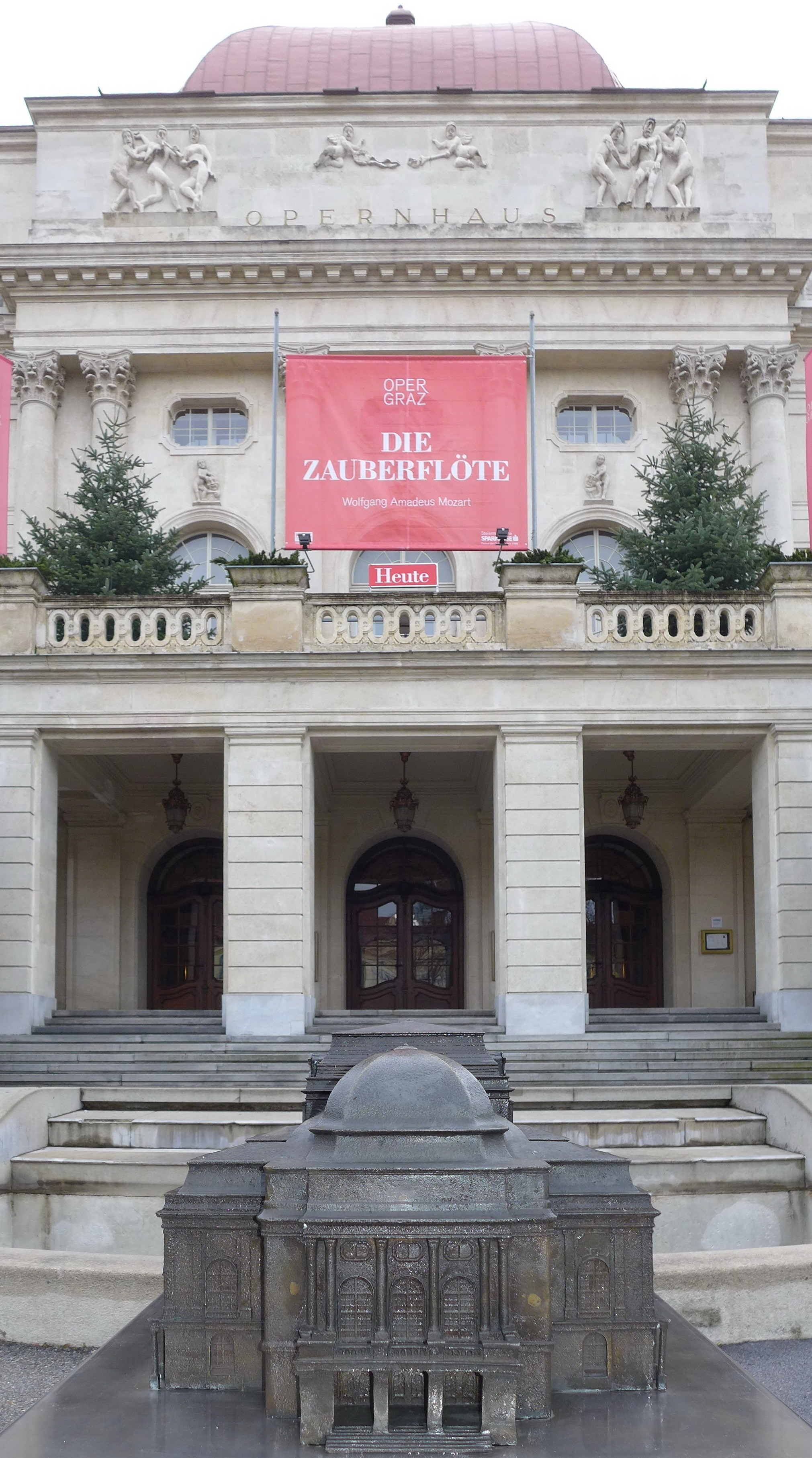 Grazer Opernminiatur vor dem Grazer Opernhaus